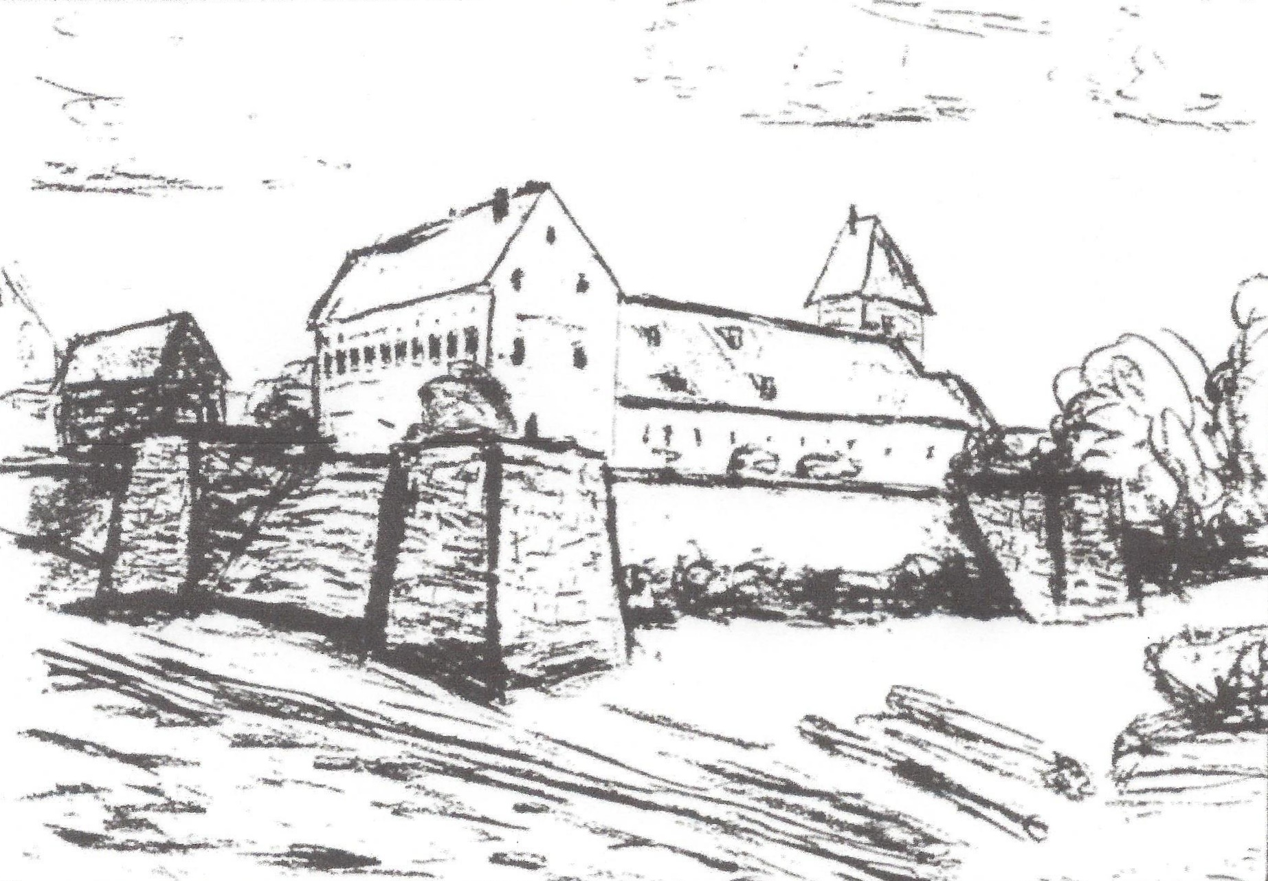 Versuch einer Rekonstruktionszeichnung der Ordensburg Tilsit